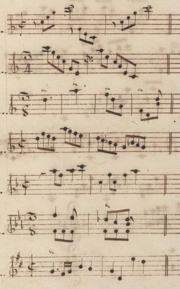 Table du volume XIII des manuscrits de Venise (incipit des sonates 1 à 7, K. 514 à 520).